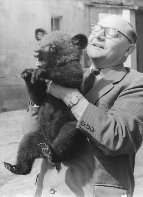 Berliner Tierpark, Prof. Dathe mit Kragenbär Zentralbild/Krisch 4.5.1961 Der erste im Tierpark Berlin aufgezogene Kragenbär wurde am 4.5.61 von Prof. Dr. Dathe vorgestellt. Diese gelungene Aufzucht eines Kragenbäres ist sehr beachtlich. Bei gutem Wetter wird sich der kleine, vierteljährige Kragenbär den Berlinern im Kinderzoo vorstellen. UBz: Prof. Dr. Dathe mit dem kleinen Kragenbär. Abgebildete Personen: Dathe, Heinrich Prof. Dr.: Direktor des Tierparks Berlin-Friedrichsfelde, DDR